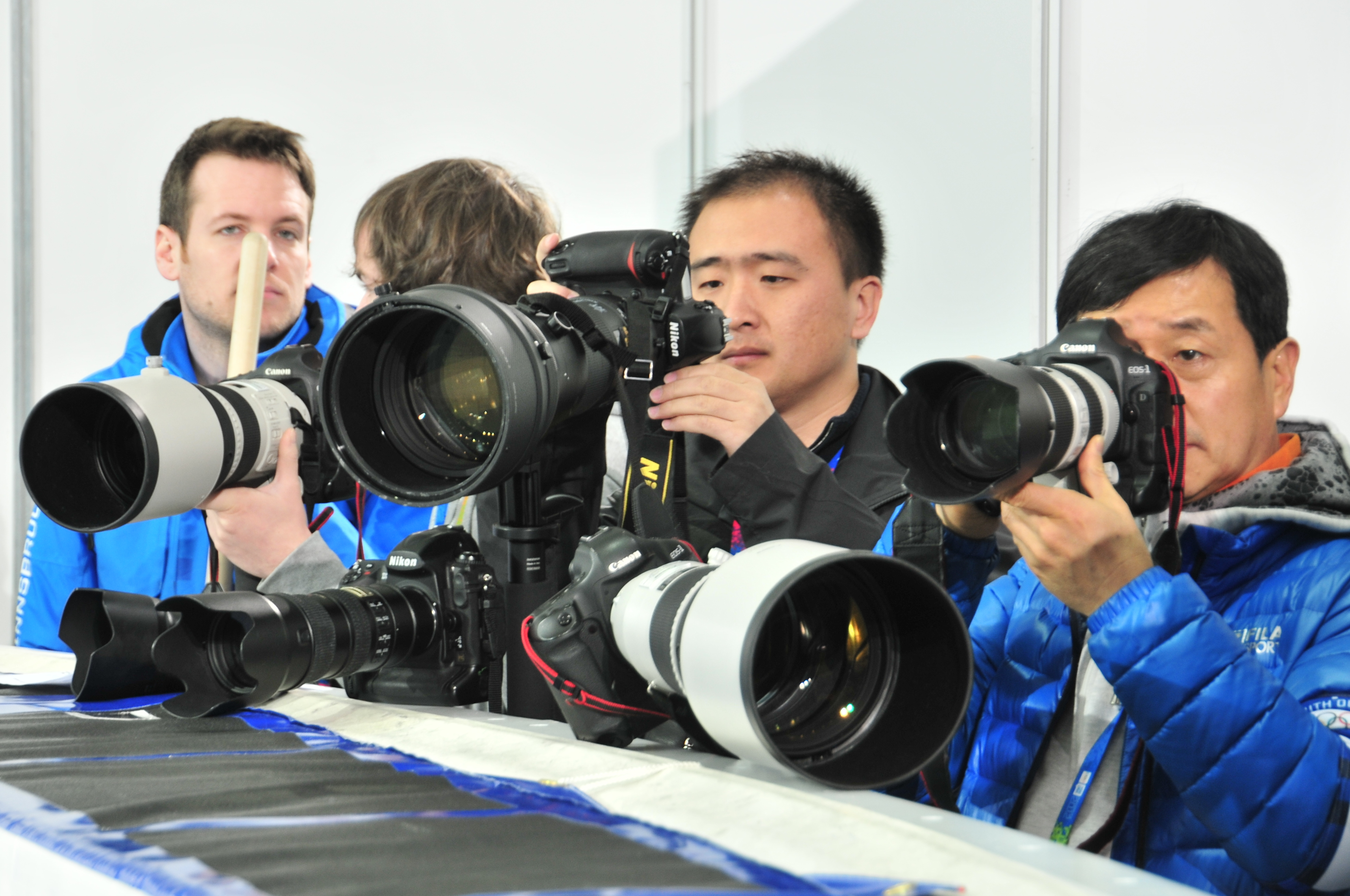 1. Jugendolympiade 2012 Innsbruck Erste Olympische Jugend- Winterspiele 201213. bis 22. Jänner in Innsbruck Dieses Foto wurde durch die Unterstützung von Wikimedia Österreich und die Twoonix Software GmbH ermöglicht.